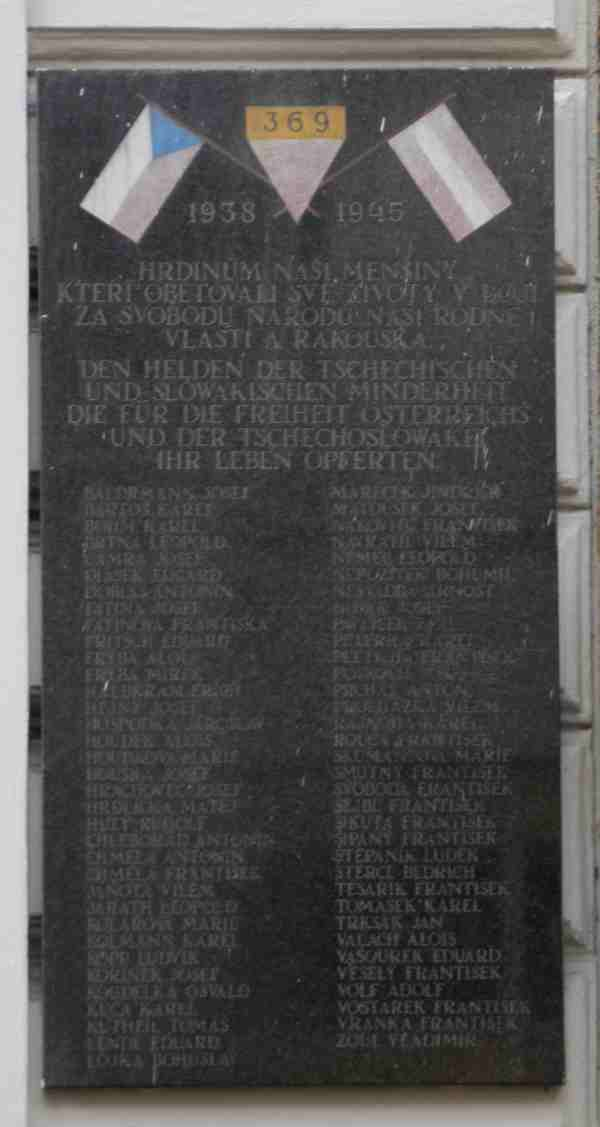 Gedenktafel am Haus Quellenstrasse 72 (Front Leibnizgasse 10)für als Widerstandskämpfer hingerichtete Angehörige der tschechischen und slowakischen Minderheit in Wien